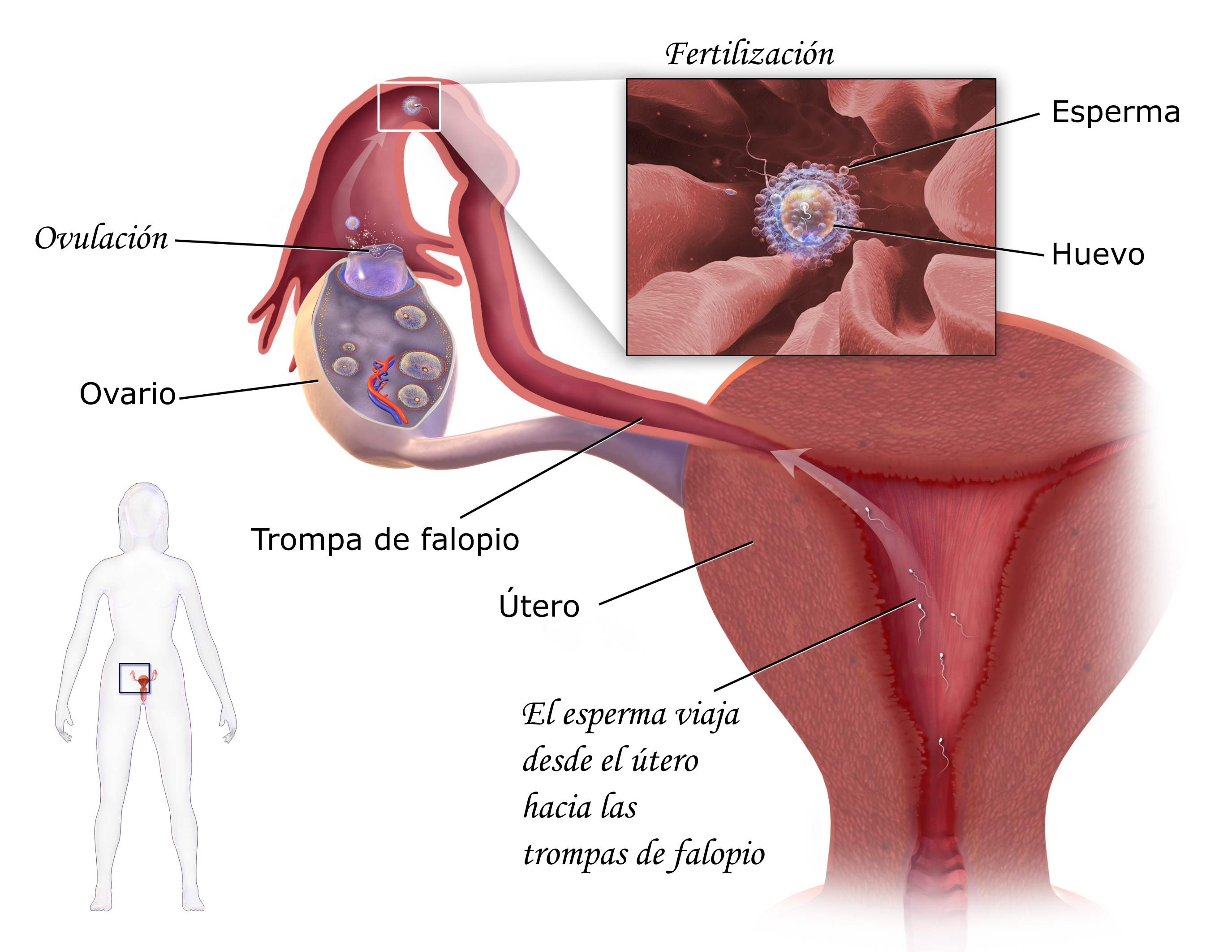 Fertilización. Ver animación completa de este tema médico.